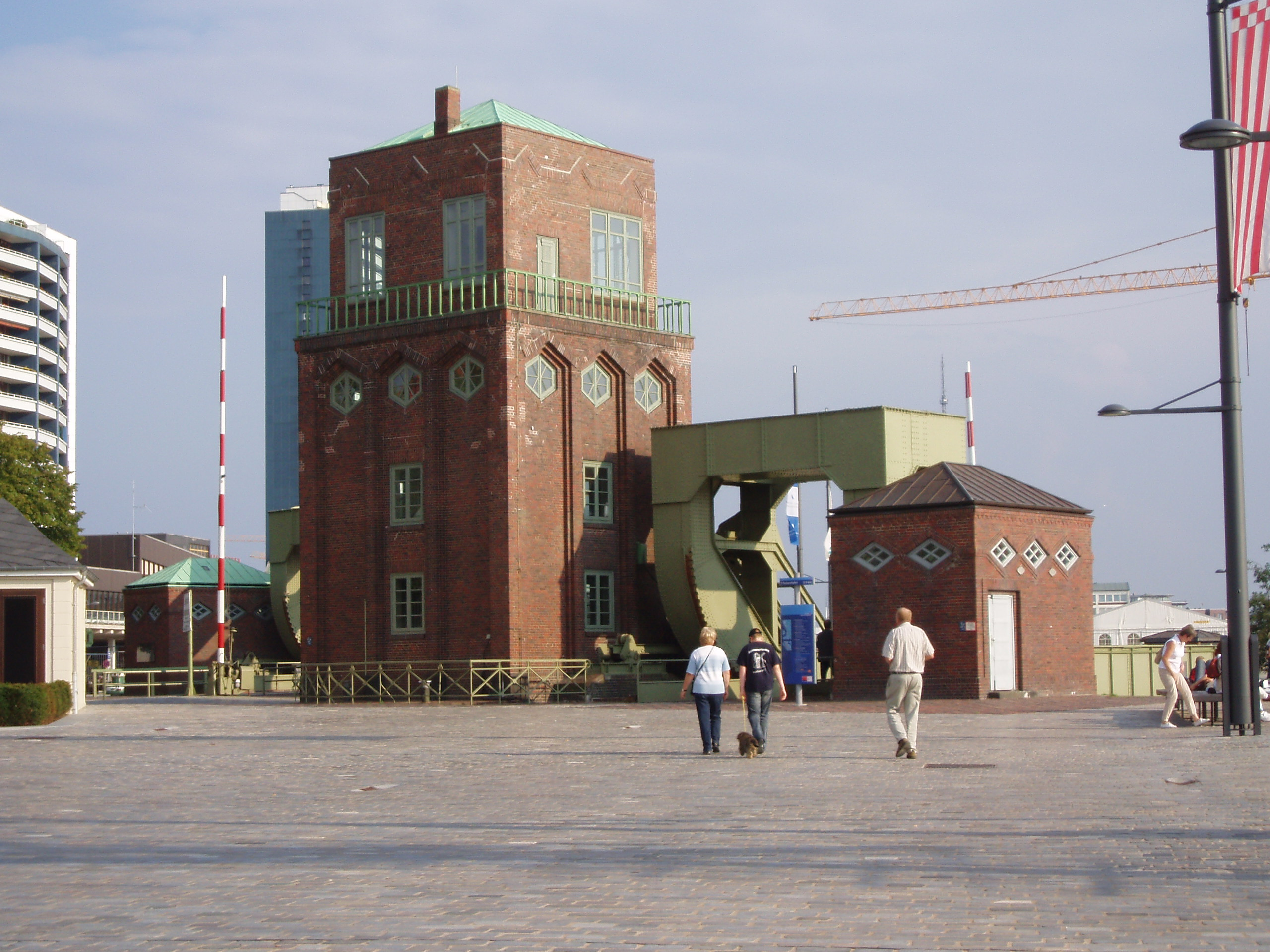 Klappbrücken für Straße (verdeckt) und Bahn zwischen Altem und Neuem Hafen in Bremerhaven. Blick von Norden. Das abgebildete Objekt ist ein geschütztes Kulturdenkmal in der Freien Hansestadt Bremen, mit der Nr. 1543 beim Landesamt für Denkmalpflege registriert.